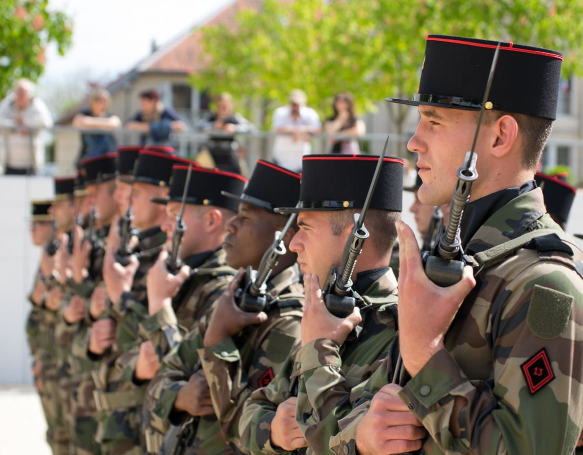 Les sapeurs du 13e régiment du génie entretiennent des liens forts avec la population du Valdahon et sont présents au coeur de la ville à l'occasion de temps forts annuels : le 8 mai,le 14 juillet et le 11 novembre.